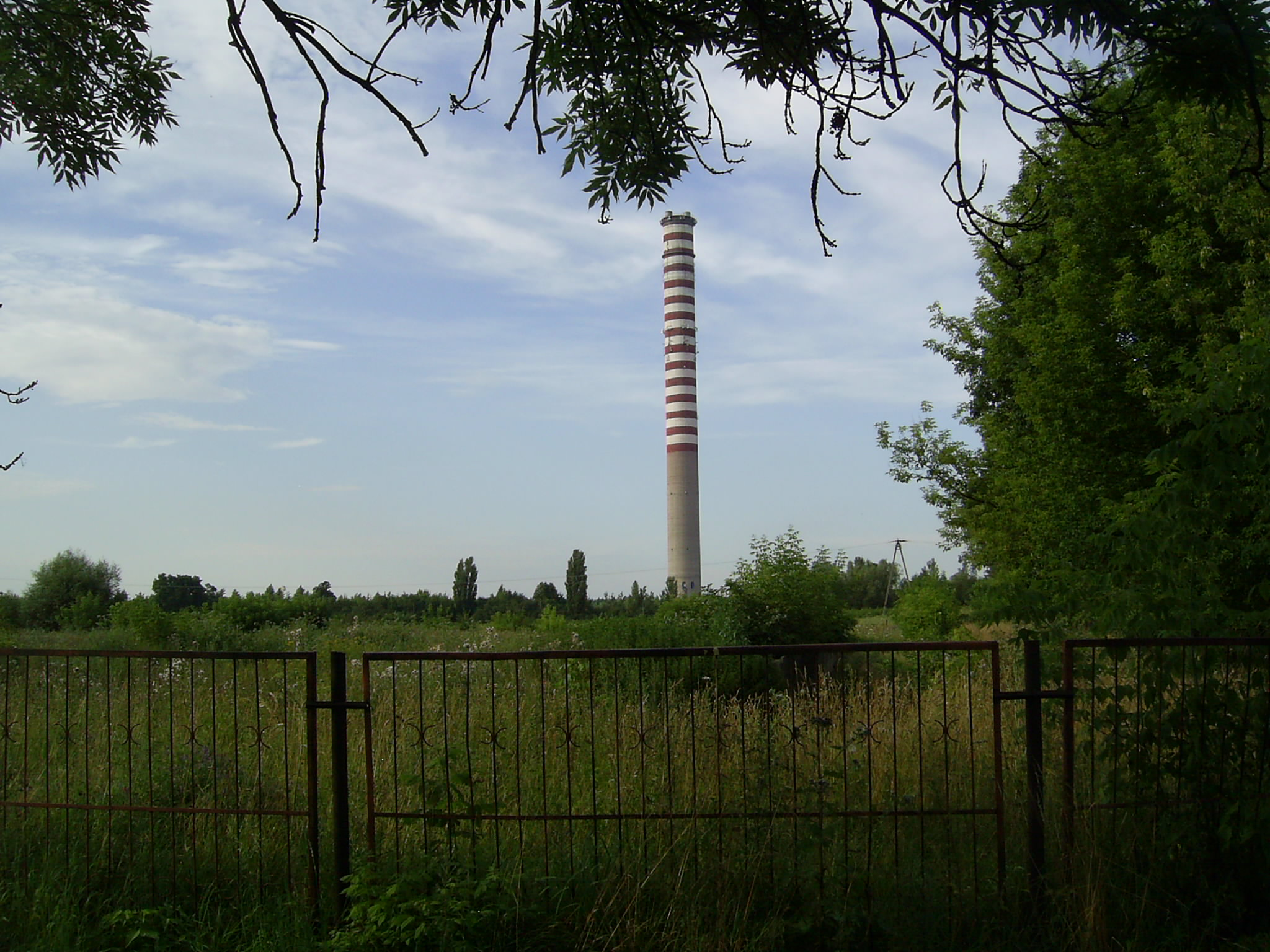 Widok z drogi w Koszajcu na Elektrociepłownię Pruszków w Mosznie